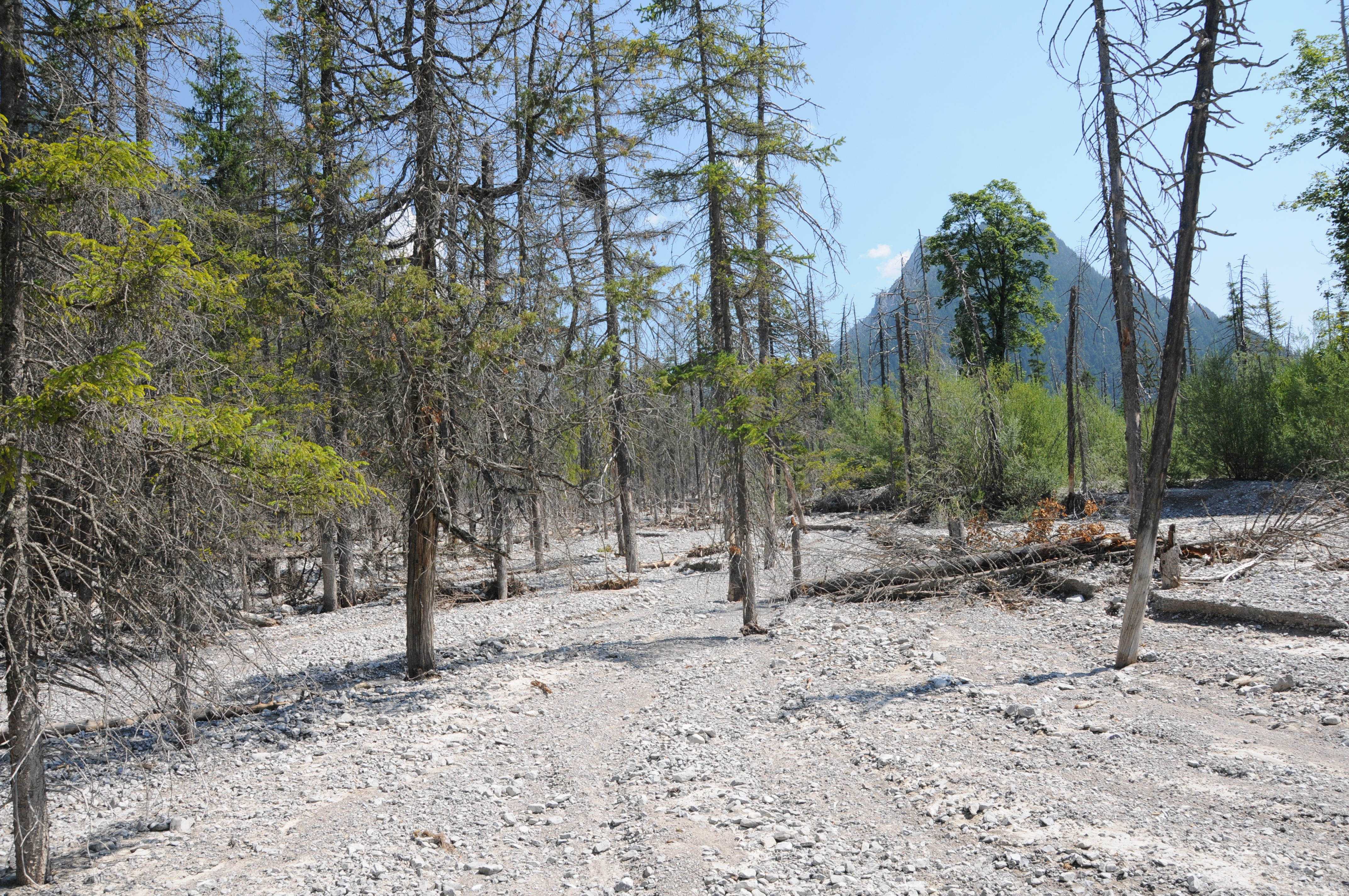 Naturwaldreservat Friedergries im Naturschutzgebiet Ammergebirge.